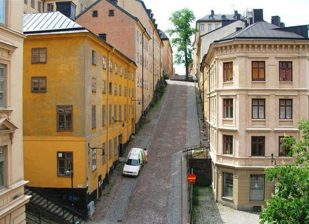 Brännkyrkagatan at Pustegränd, Besvärsbacken, Södermalm, Stockholm, Sweden.